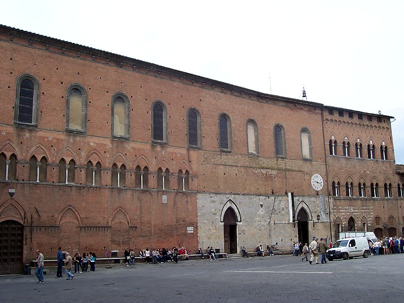 Siena - Spedale di S. Maria della Scala